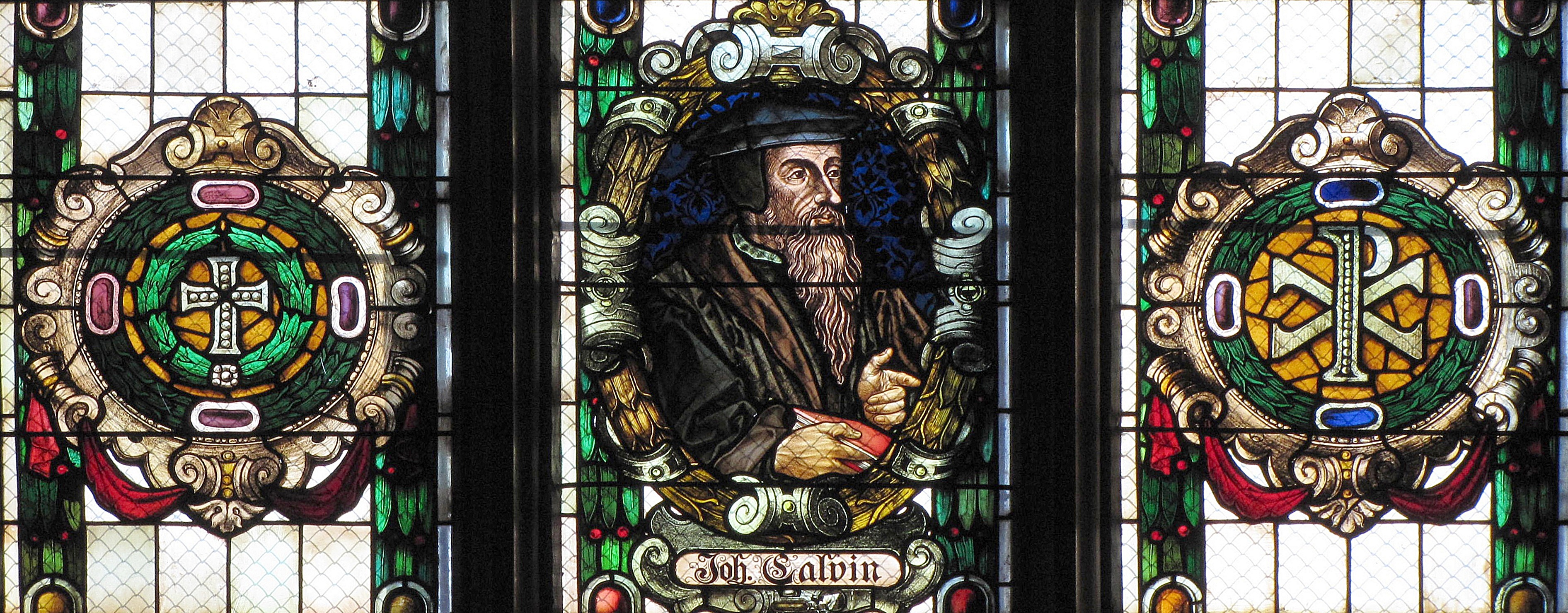 Alsace, Bas-Rhin, Église protestante Saint-Sauveur de Strasbourg-Cronenbourg, rue Jacob. Vitrail représentant Jean Calvin (XXe)